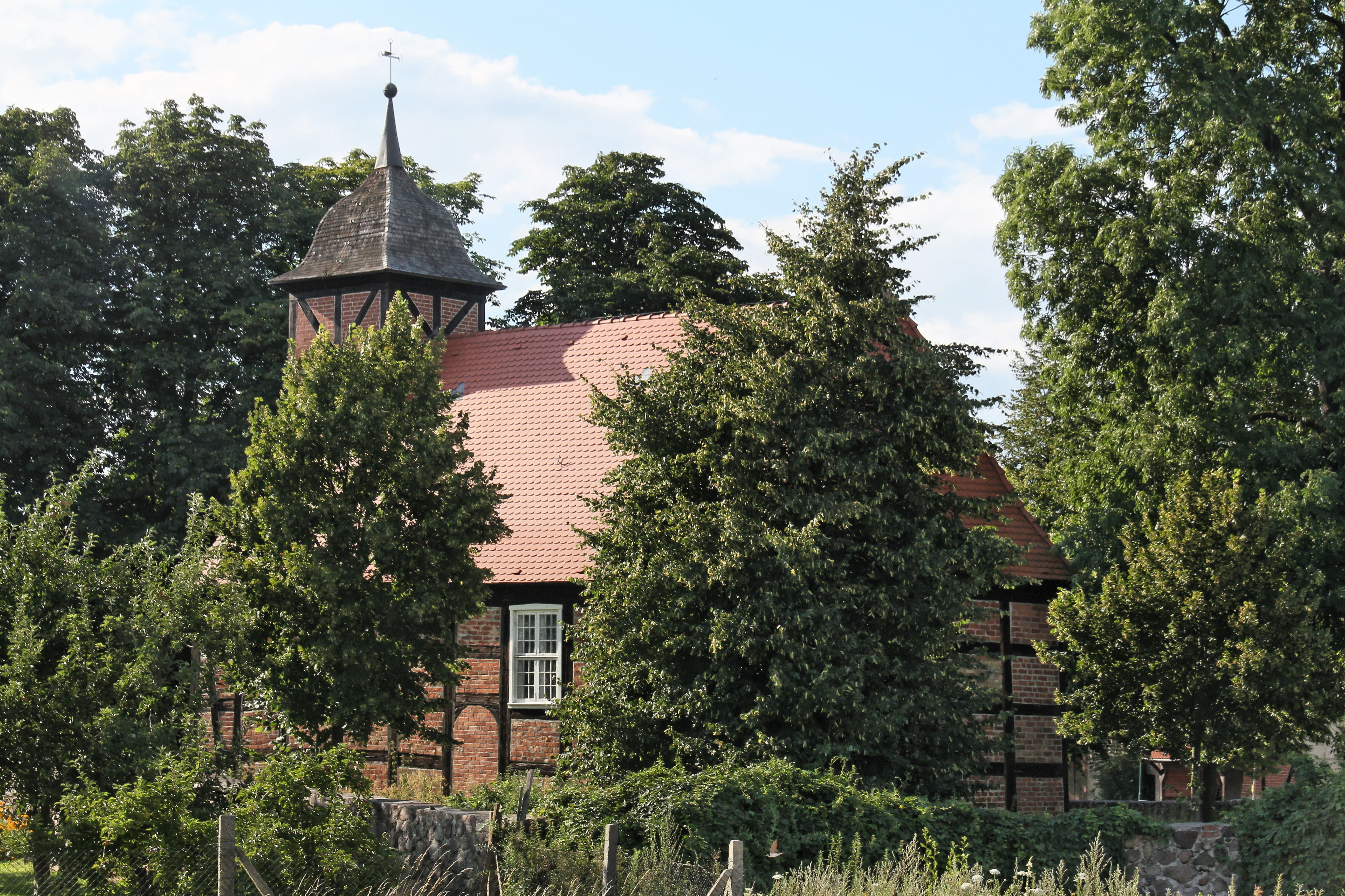 Dorfkirche Krugsdorf This is a photograph of an architectural monument.